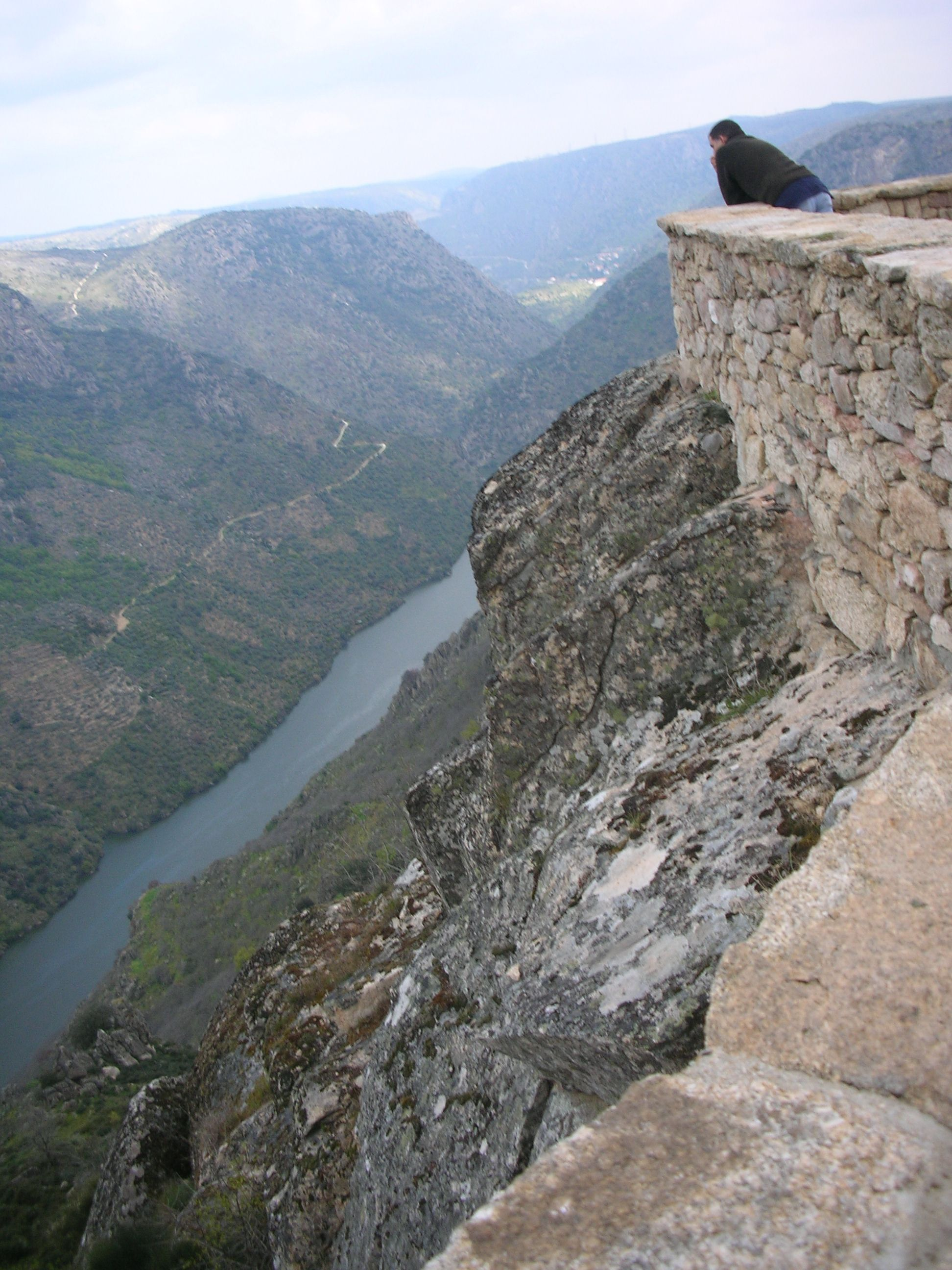 Vista del Duero desde el mirador del Águila, en Mieza, provincia de Salamanca, España